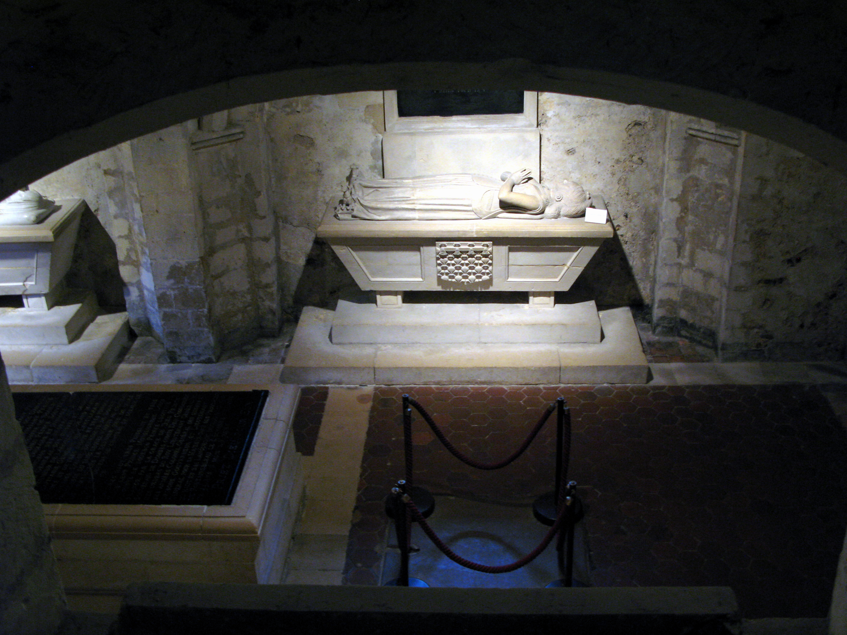 Eu (Seine-Maritime, France) - Vue plongeante dans la crypte de la collégiale, depuis une ouverture latérale sous le choeur. Ce tombeau est celui d'Isabelle d'Artois. .